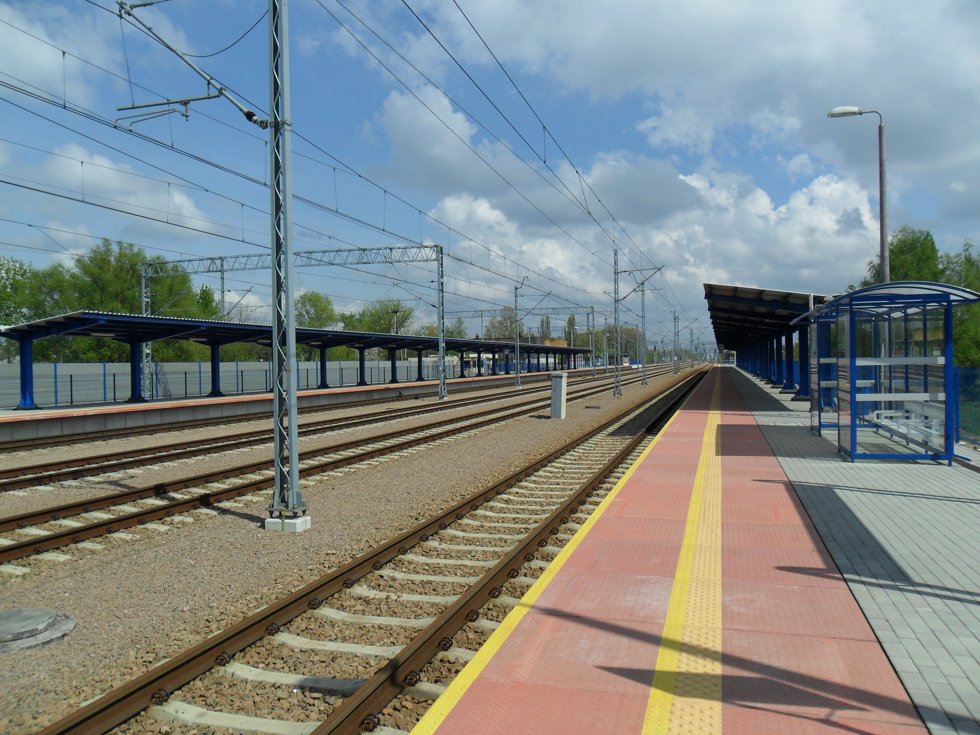 Dworzec PKP Tarnów Mościce